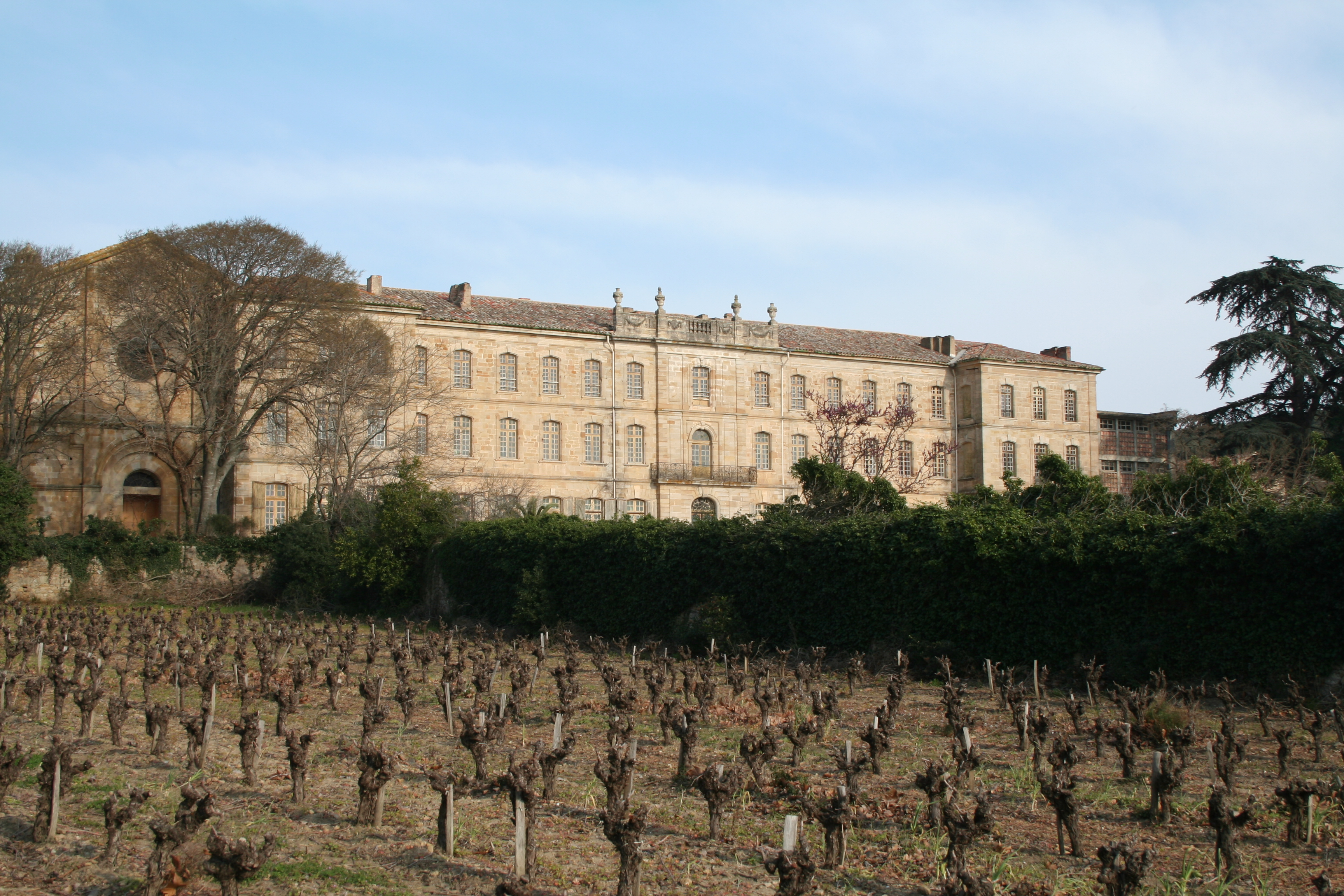 Roujan (Hérault) - Abbaye de Cassan (Château de Cassan) - façade occidentale.